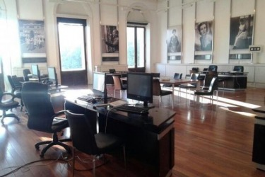 El Salón de las Mujeres Argentinas transformado en oficina (Gobierno de Mauricio Macri, diciembre 2015)